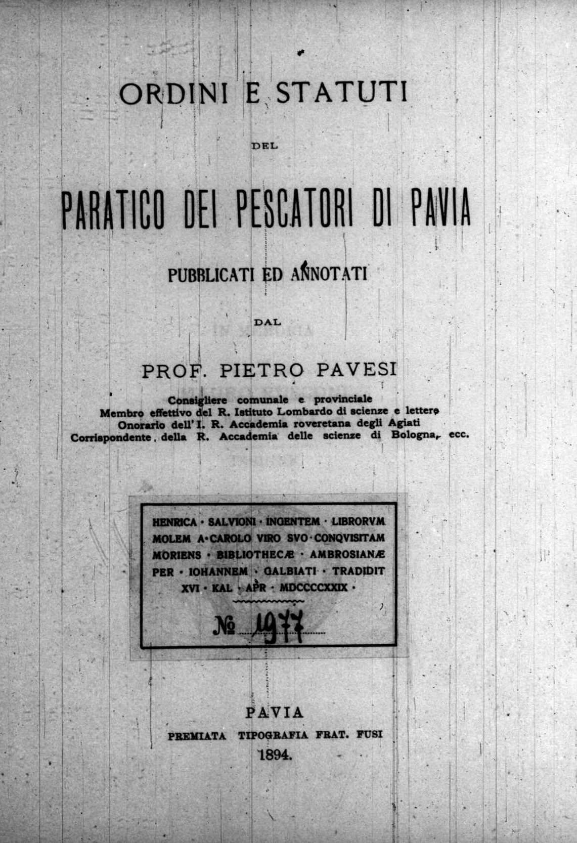 Frontespizio